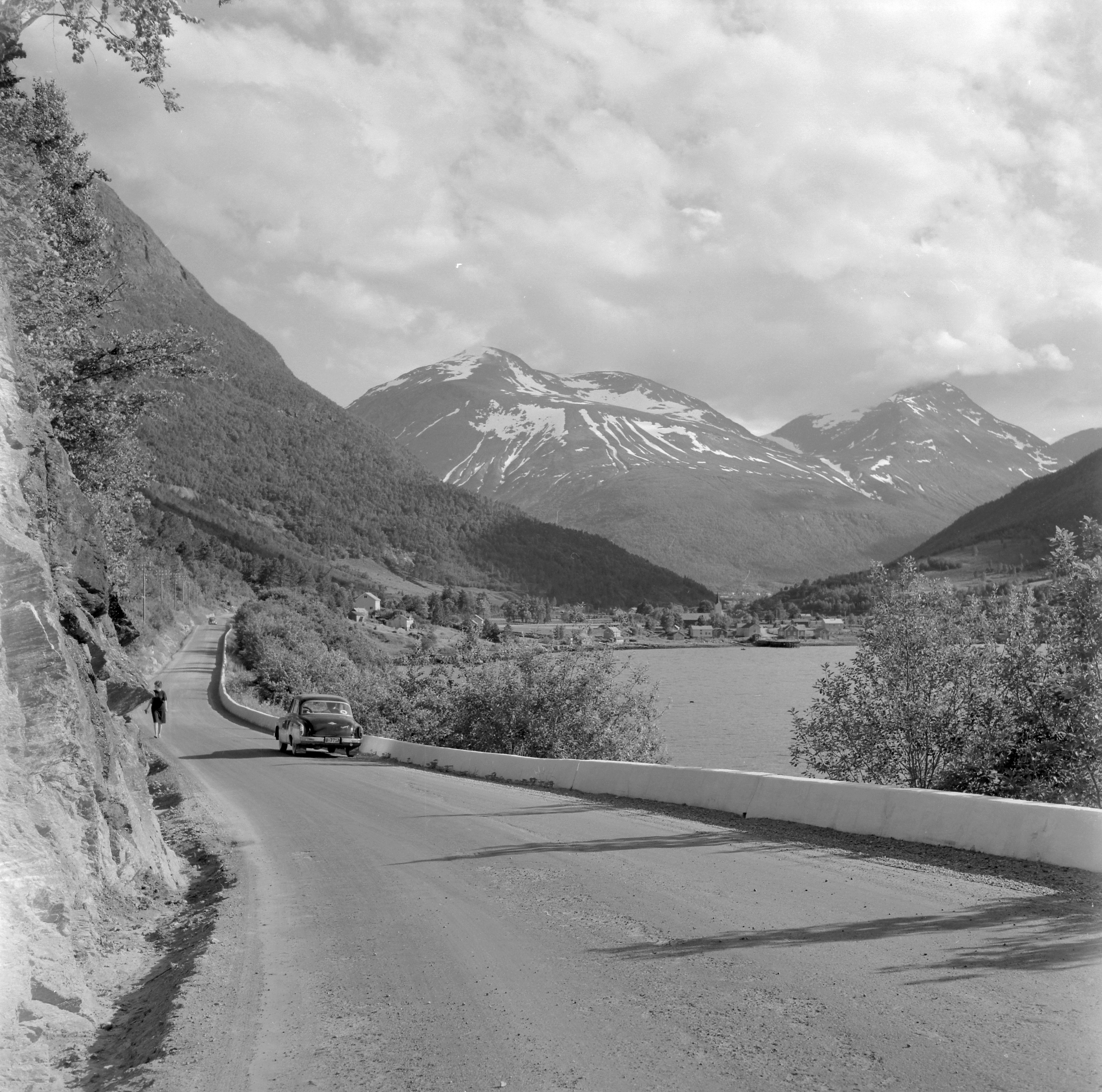 Øksendal in Sunndal, Norway